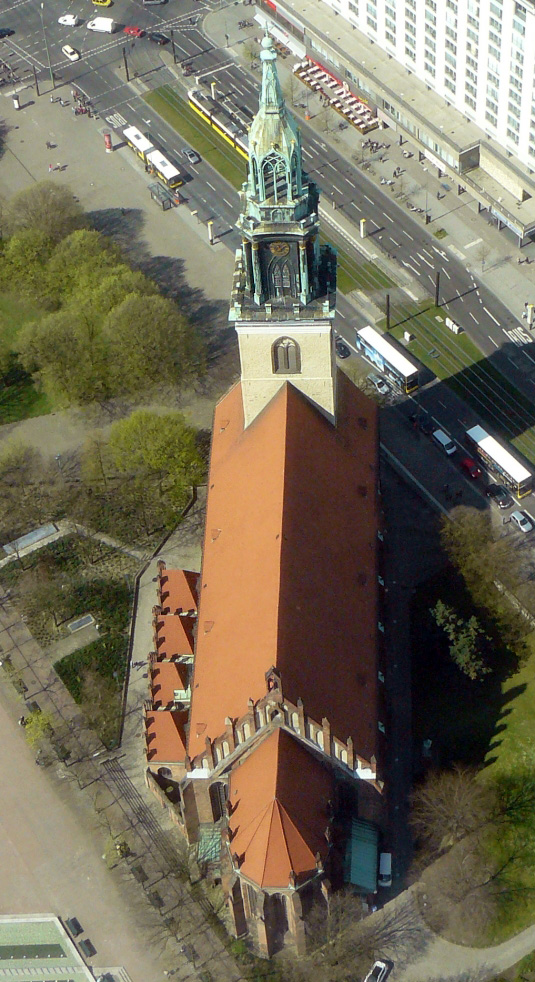 St. Marienkirche in Berlin-Mitte vom Fernsehturm aus fotografiert